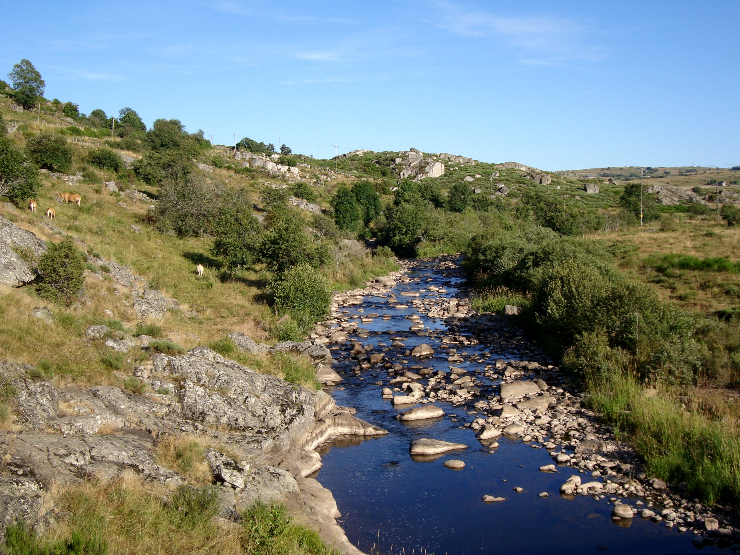 Le Bès dans la vallée de Recoules d'Aubrac (Lozère).